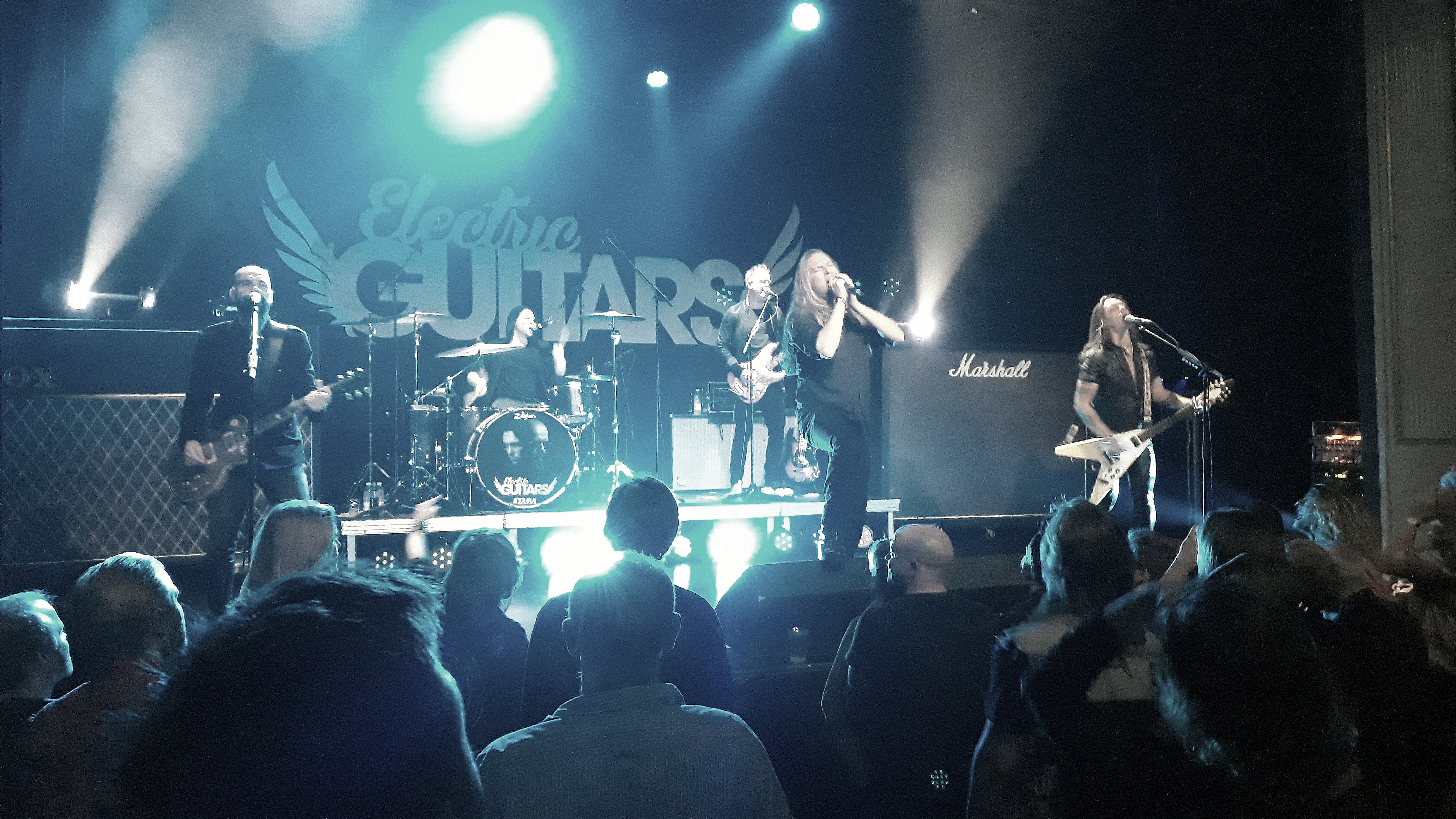 Electric Guitars' koncert i Hjørring